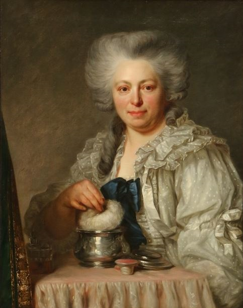 Portret van Isabelle Depestre, gravin van Seneffe, door Antoine Vestier. In 2017 aangekocht door Erfgoedfonds | Erfgoed KBS